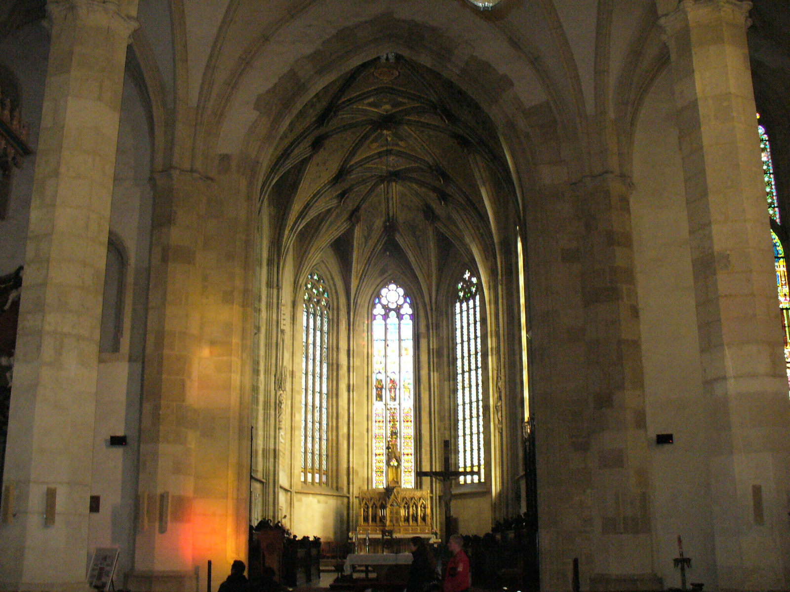 Konkatedrála svätého Martina v Bratislavie Konkatedra św. Marcina w Bratysławie Konkathedrale des Heiligen Martins in Pressburg